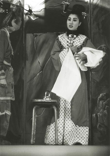 未成名的楊麗花，跟著母親到高雄唱戲的鏡頭 (1962年前) 參見/ While the exact date of her performance is unknown, however, this picture was definitely shot before 1962 and the 50-year protection has expired.